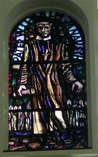 Kirchenfenster von Pater Janauschek in der Pfarrkirche Liesing von Martin Häusle